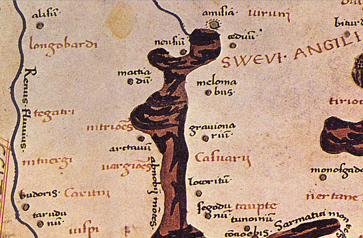 Die Ortsbezeichnung "BOUDORIS" (hier "budoris"), Detailbild von der Karte zur Germania magna.